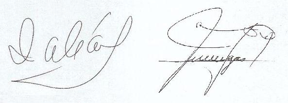 Autogramme von Sabás Ponce und José Villegas, die Spieler mit den meisten Meistertiteln in der mexikanischen Primera División|Primera División (Mexiko)|Primera División